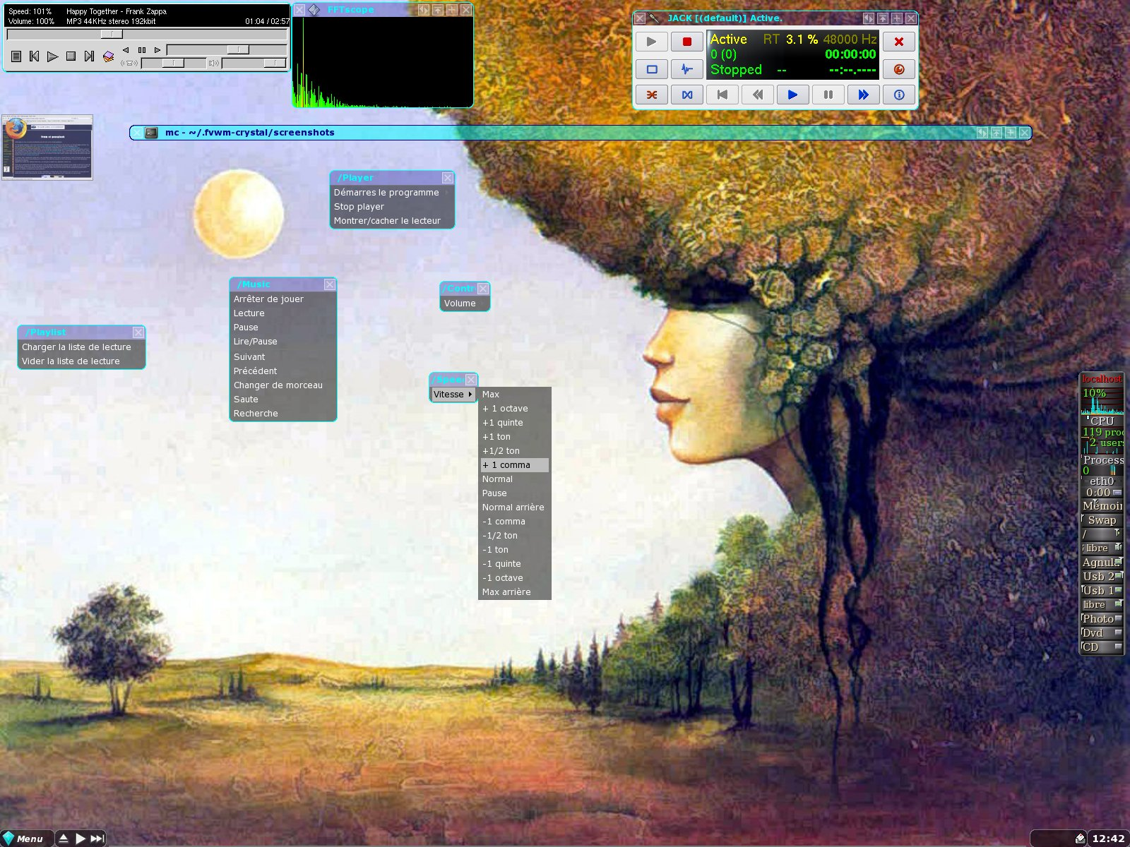 Fvwm-crystal avec un thême personnel. Réalisé par moi-même en 2006 de même que le thême utilisé par FVWM-crystal. Ce thême incorpore un contrôle étendu de mon lecteur audio préferré. Ce lecteur peut être controlé à la souris quand le curseur est en dessus du deuxième bouton visible dans le coin inférieur gauche, ou depuis les menus détachables de ce même bouton. Il est ainsi possible de lancer ou arrêter le lecteur, de charger une liste de morceaux, de changer de morceau, de controller la vitesse de lecture, etc. Ce petit contrôle donne une idée des possibilités de personalisation de FVWM-crystal (les mêmes que celles de FVWM). Nous pouvons aussi personnaliser les fenêtres de chaque programmes. Le lecteur n'a pas de barre de titre alors que qjackctl à droite en à une. L'icône à gauche en dessous du lecteur est une miniature du programme, firefox, au moment où je l'ai minimisé. Elle contient en plus l'icône de Firefox. La barre horizontale bleu claire est une console enroulée sur sa barre de titre. Les coins de fenêtres sont arrondis. Tout en bas, la barre des tâches n'est pas visible car je l'ait faite escamotable. FVWM-crystal with personal theme. Own work in 2006 as well as the theme. Some added functionalities of the theme: improved audio player control with speed control, mouse control and menu control, improved audio button, auto-hiding taskbar (not visible on the picture), round corners and more.